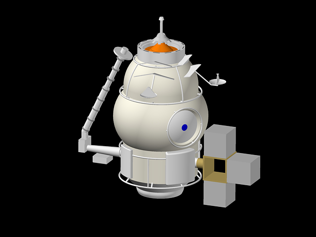 A Nemzetközi Űrállomás MRM-2 moduljának egyszerűsített grafikus ábrázolása